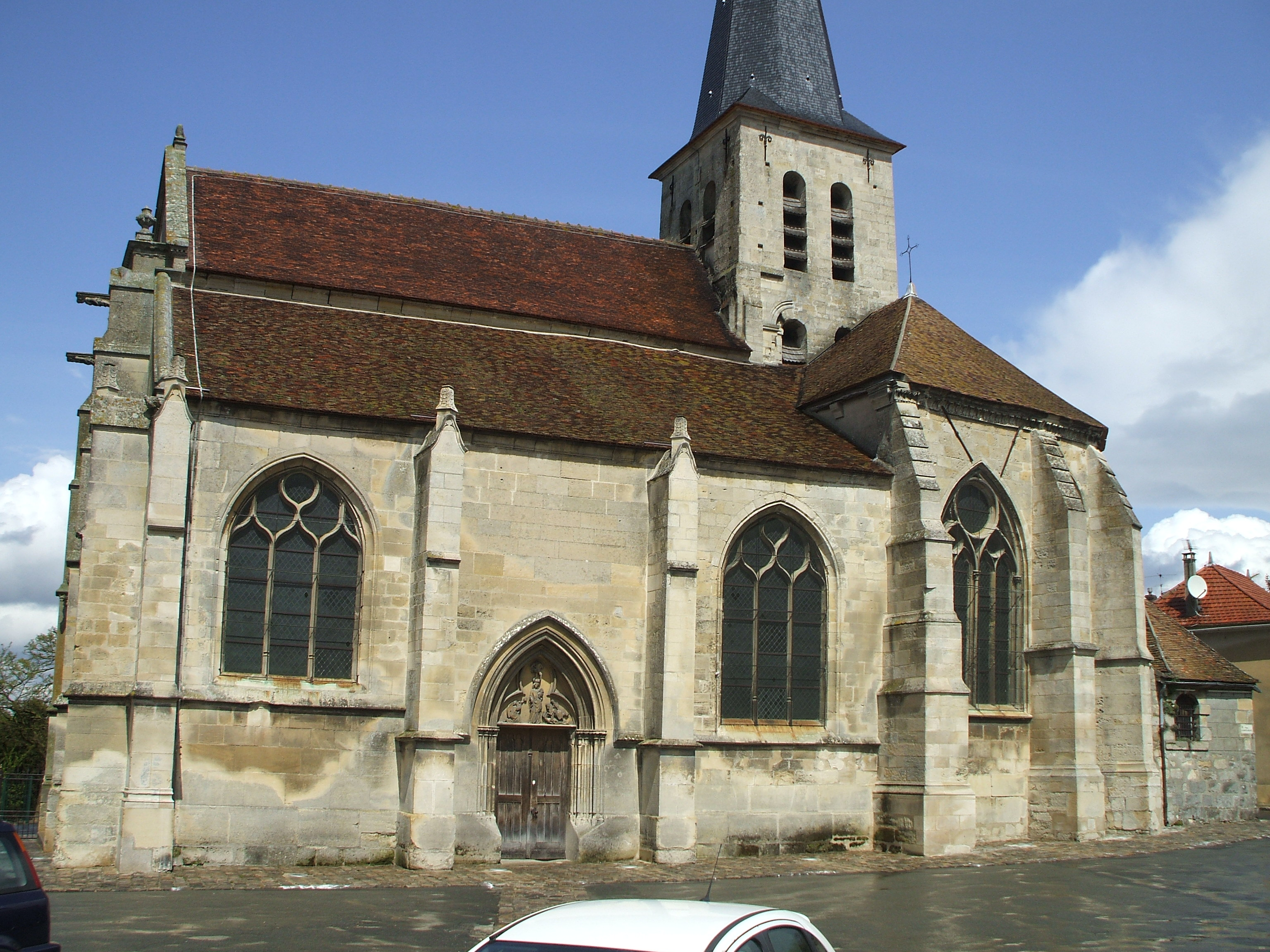 face sud église de belloy en france val d'oise france